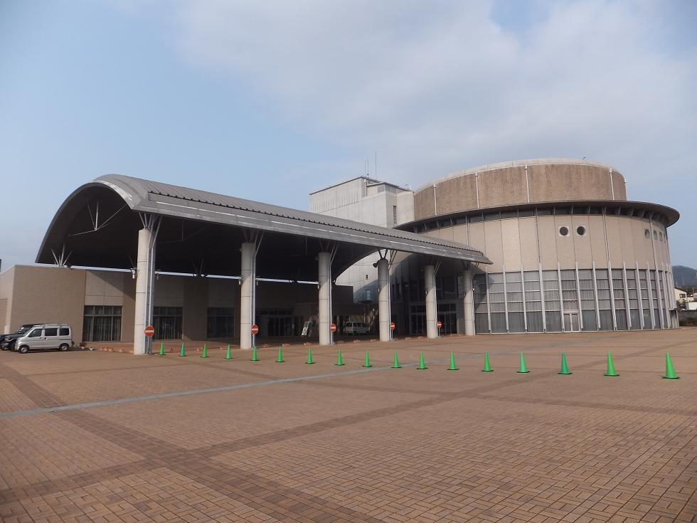 丸亀市綾歌町栗熊。丸亀市綾歌総合文化会館アイレックス。